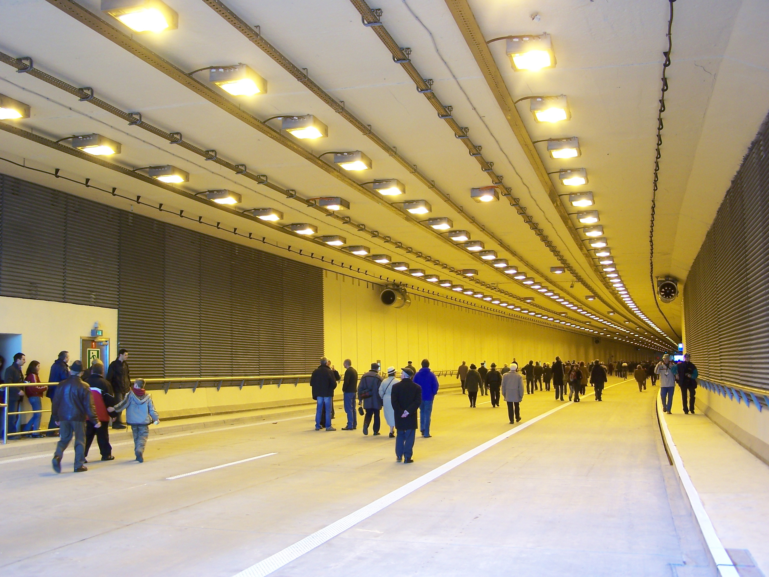 Tunnel unter dem Kreisverkehr des Jerzego Ziętka in Kattowitz.